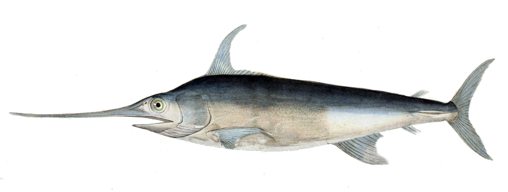 Xiphias gladius